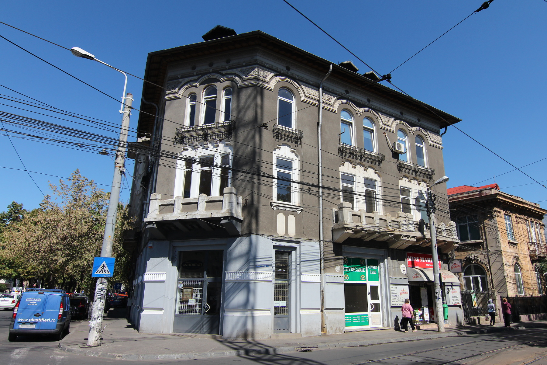 Imobil pe Calea Călărașilor